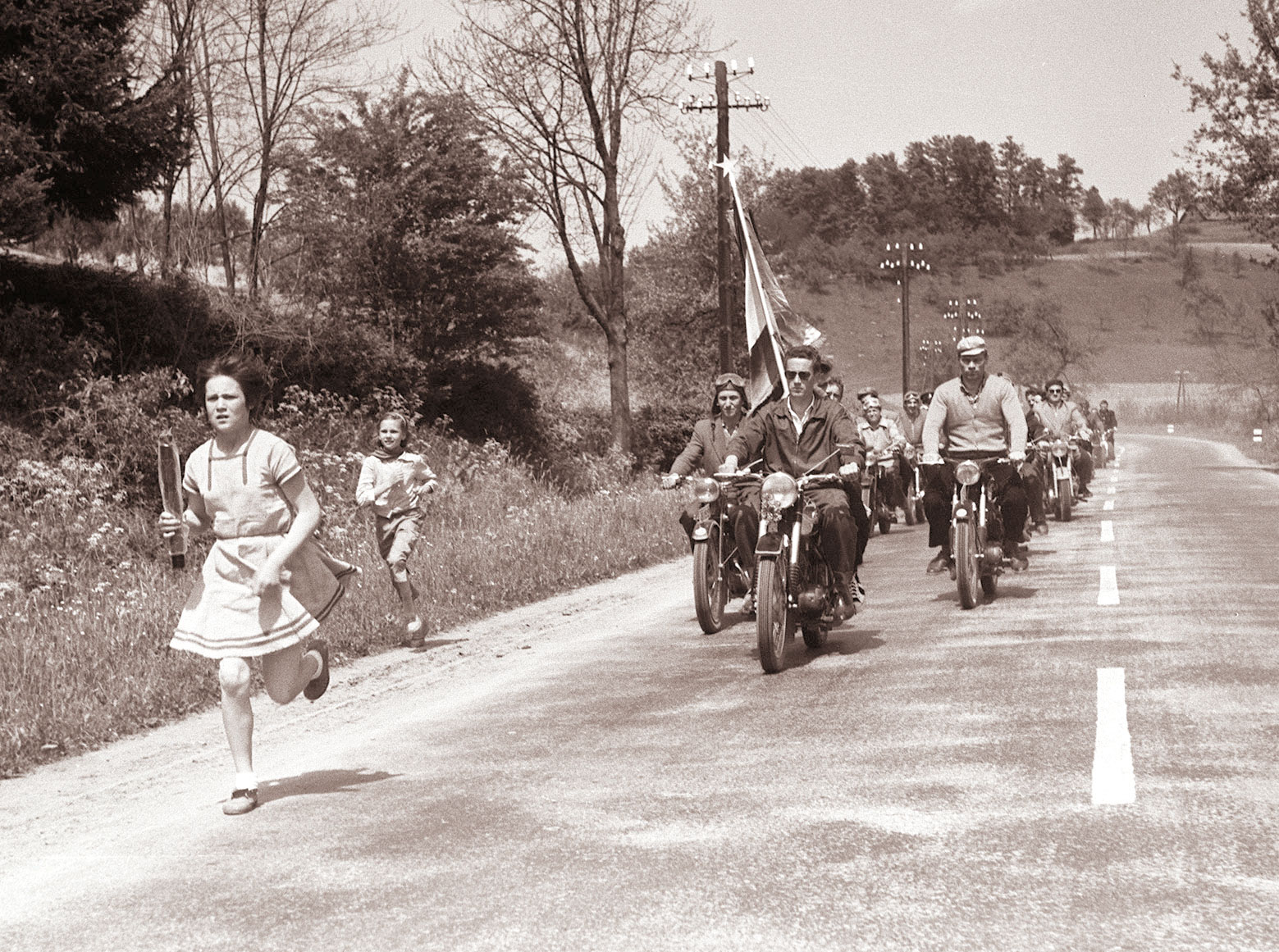 Republiška štafeta mladosti je krenila iz Šentilja, mimo Pesnice in skozi Košake do Maribora.